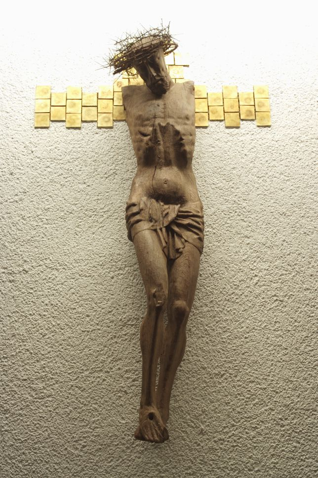 Mater.Dolorosa.Christus